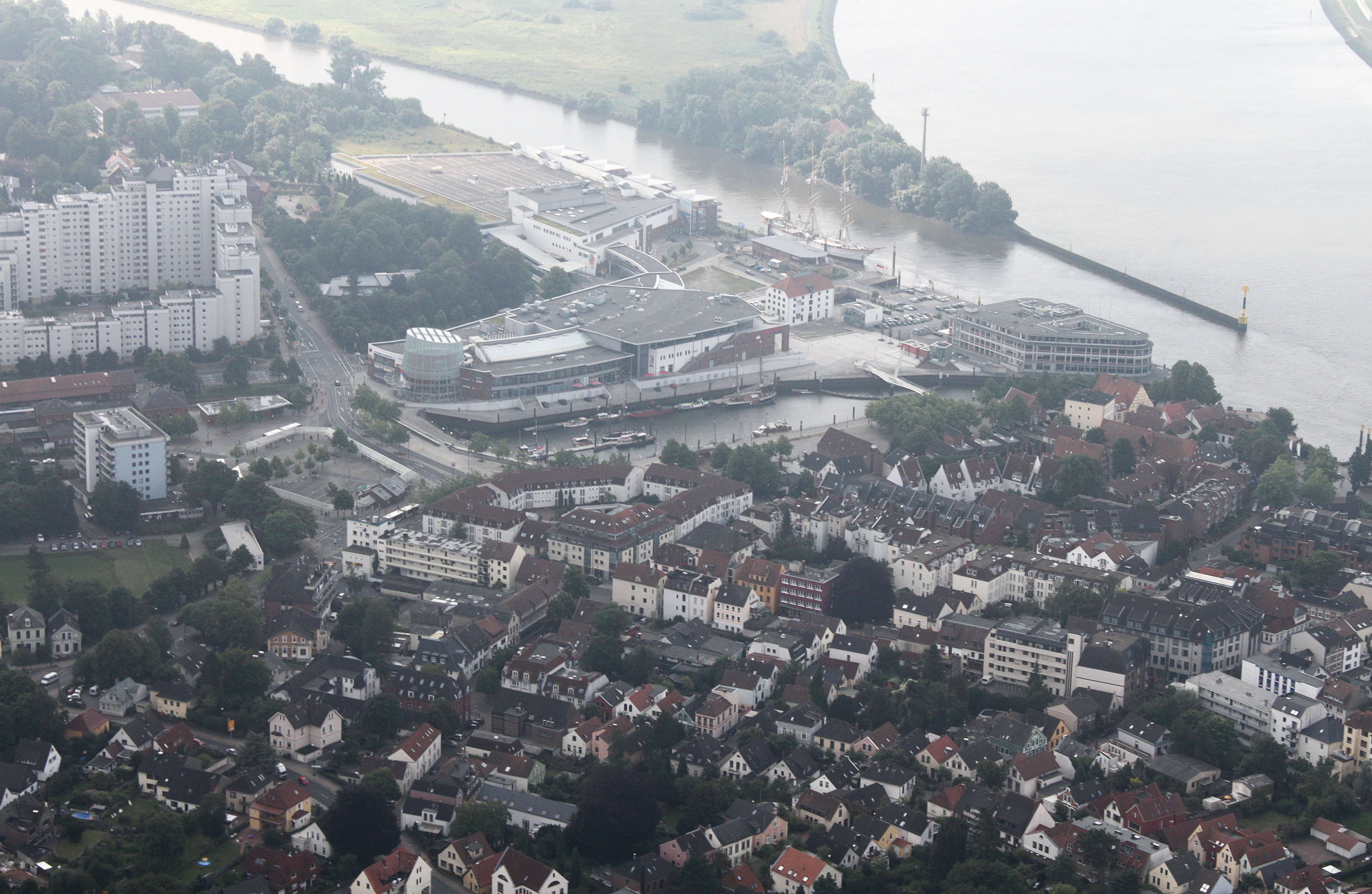 Fotoflug Bremen; Flughöhe 500 m; Vegesack, Haven Höövt, Schulschiff Deutschland